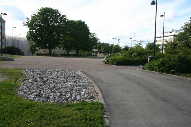 Hiekkakenttä Katri Valan puistossa, Helsingissä.